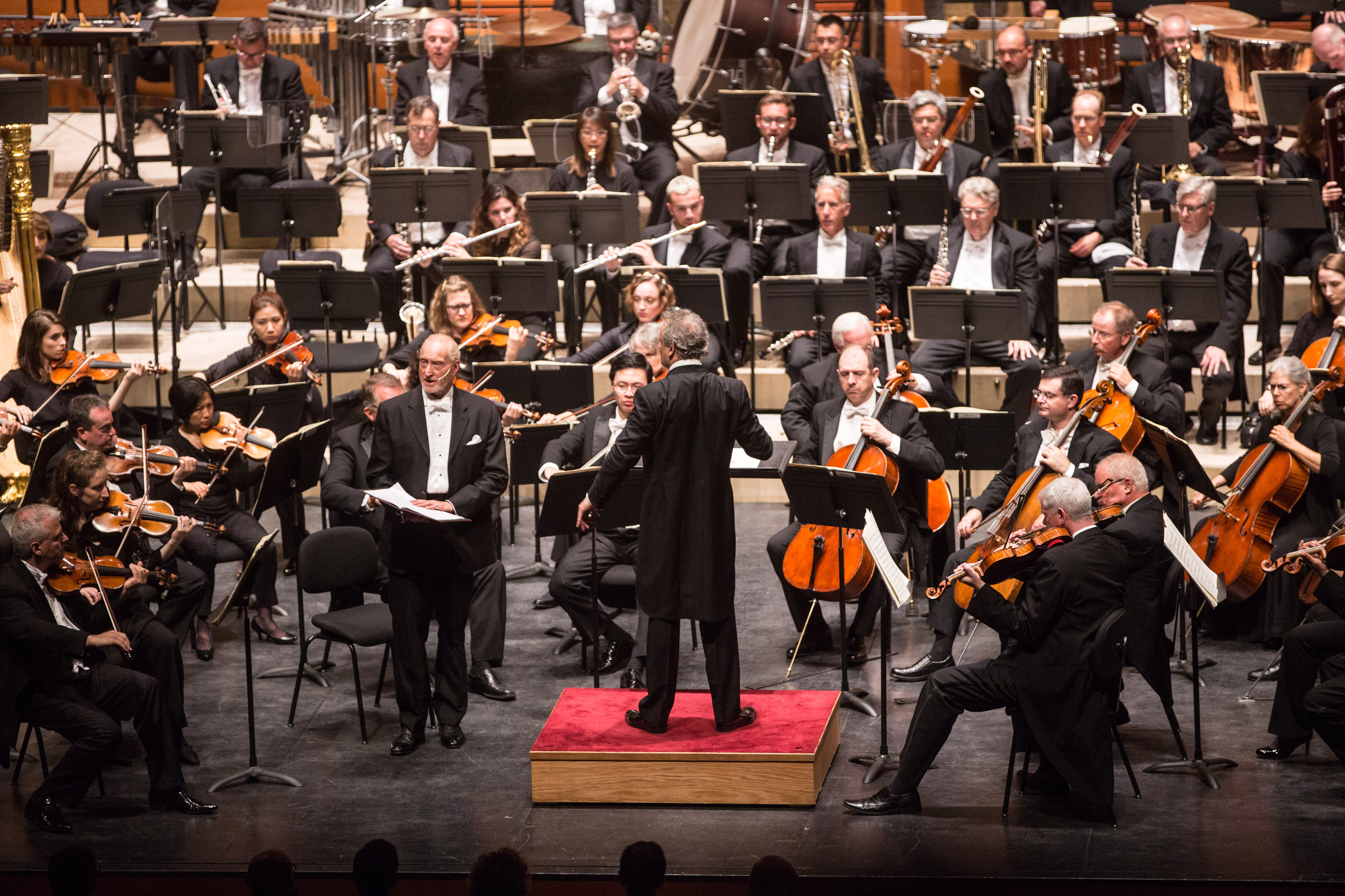 ©Quincena Musical- Iñigo Ibáñez